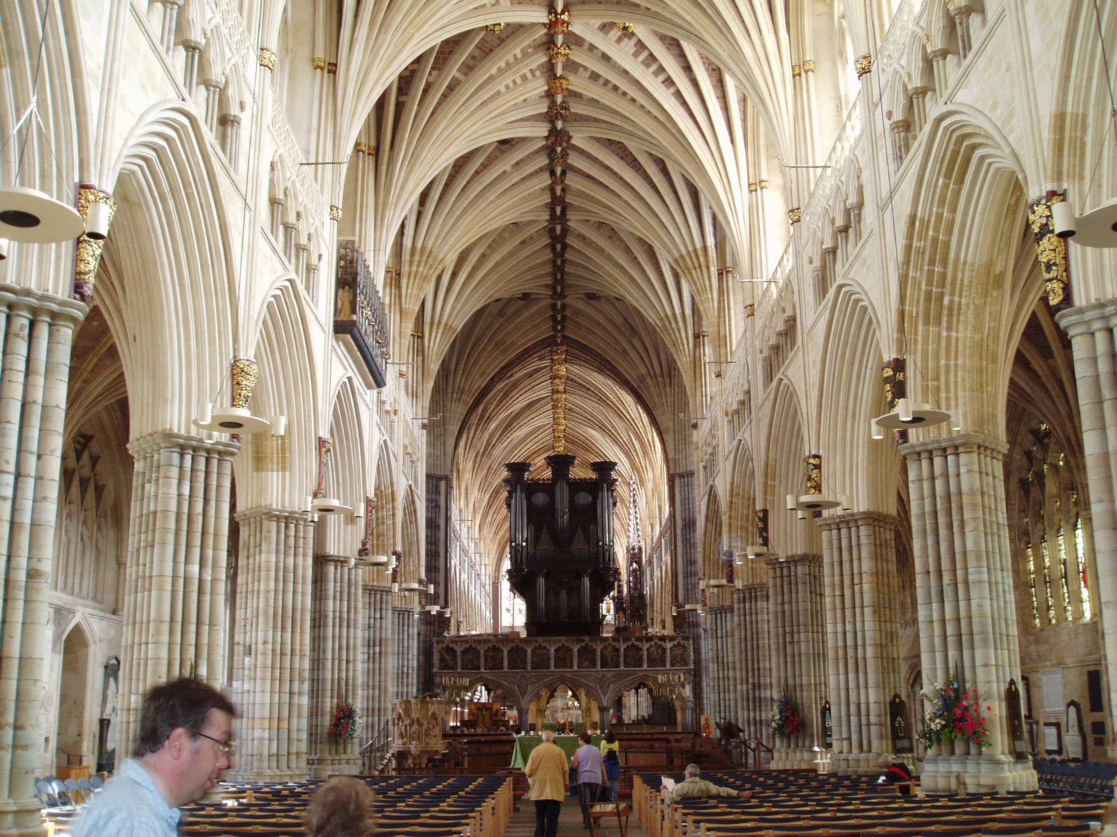 Das Hauptschiff der gotischen Kathedrale von Exeter in Südengland